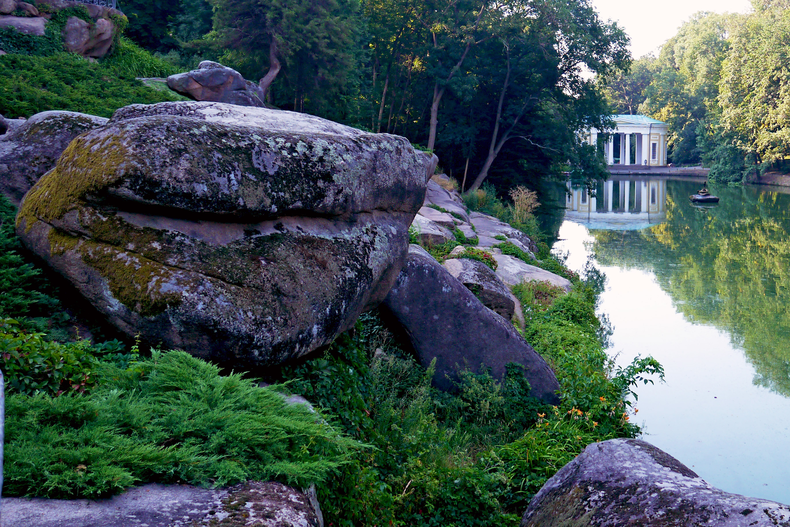 4.4. Левкадська скеля, Умань, вул. Садова, 55 (парк «Софіївка»)